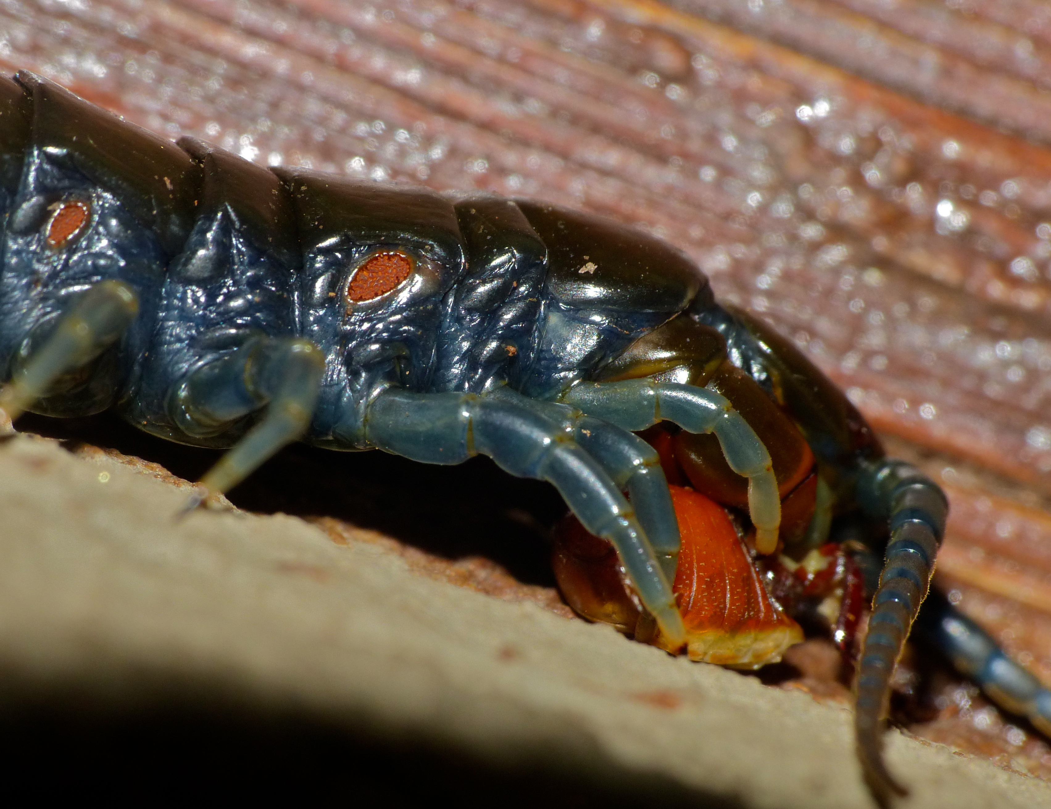 Safari Tent N°7, Lower Sabie Camp, Kruger NP, SOUTH AFRICA